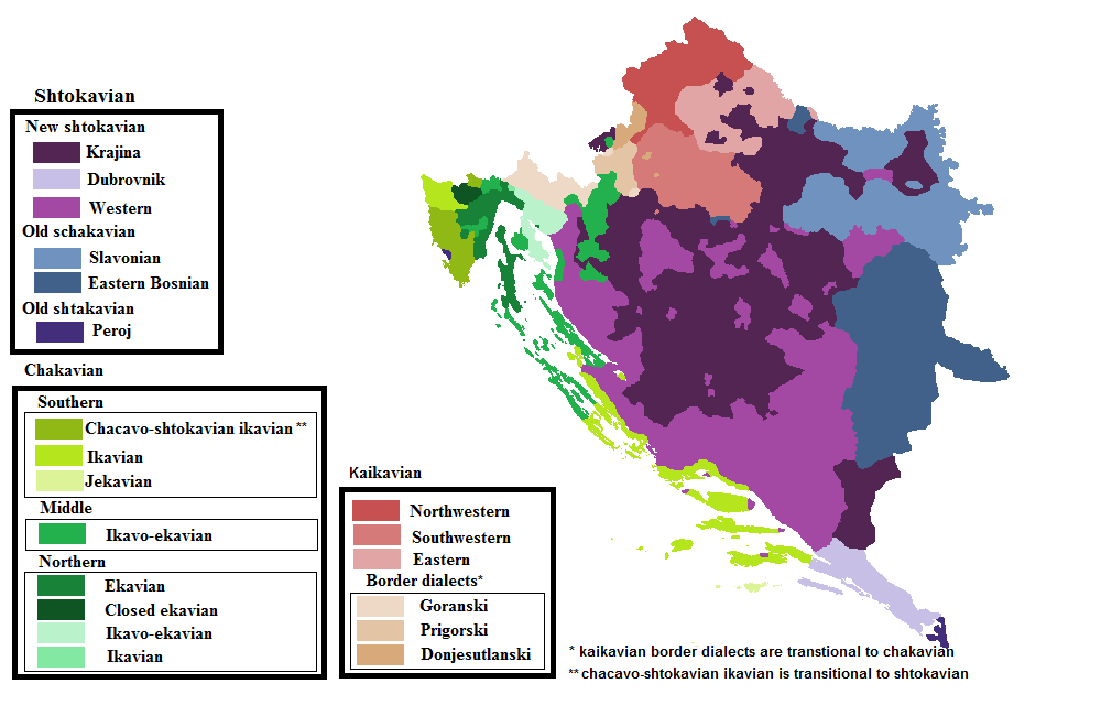 Hrvatski dijalekti po Ivi Lukežić. Ona nabraja još 2 čakavska (sjevernočakavski ikavski koji se nalazi u enklavi Klane i Studene te ikavo-ekavski, koji se inače svrstava u srednječakavski, kao njegov primorski poddijalekt) Te 2 štokavska (dubrovački i perojski, a istočnohercegovački dio novoštokavske jekavice isključuje iz hrvatskih dijalekata)